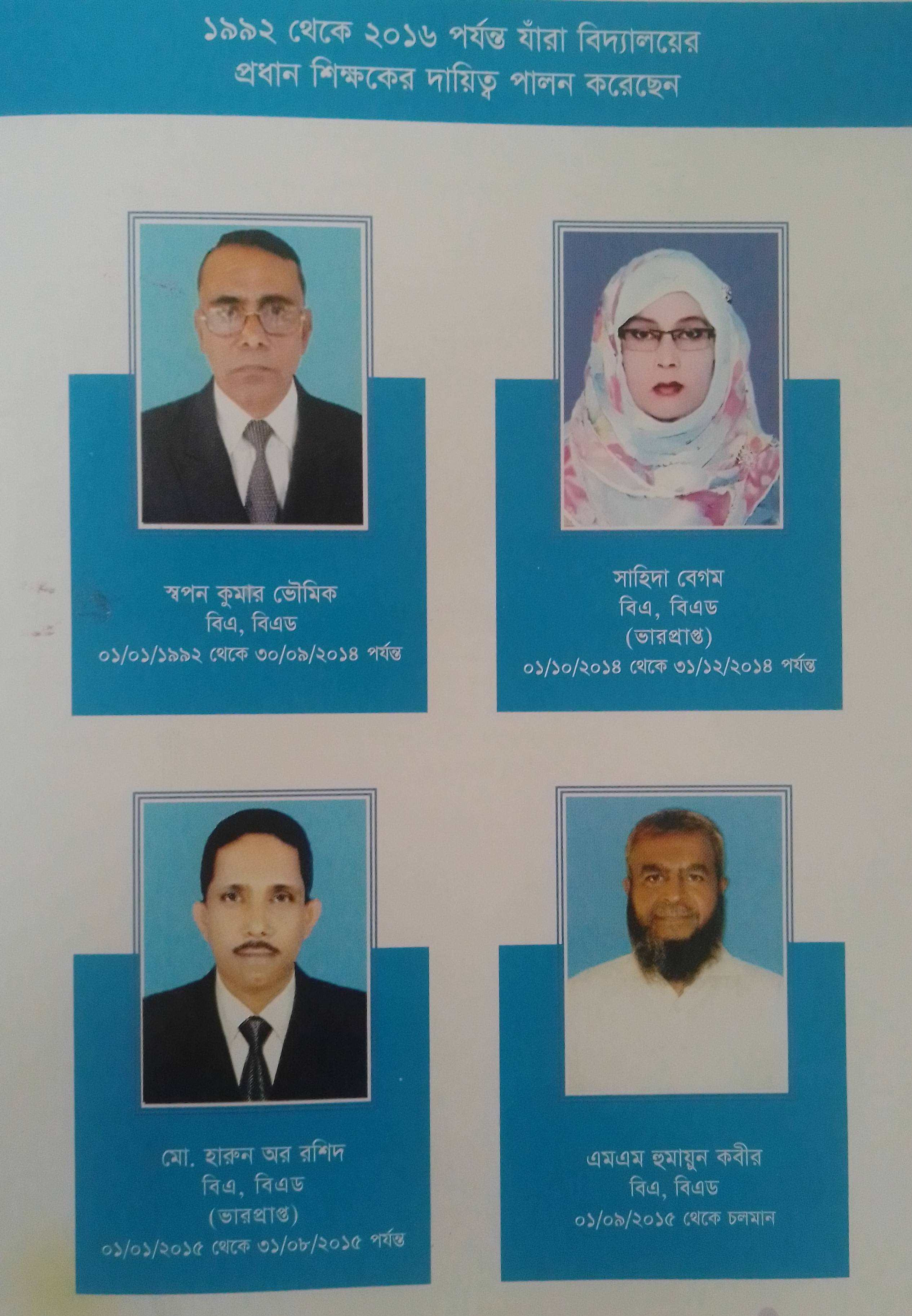 এই ছবি বিদ্যালয়ের সাহিত্য সাময়িকি “অনির্বাণ” থেকে তুলেছি।